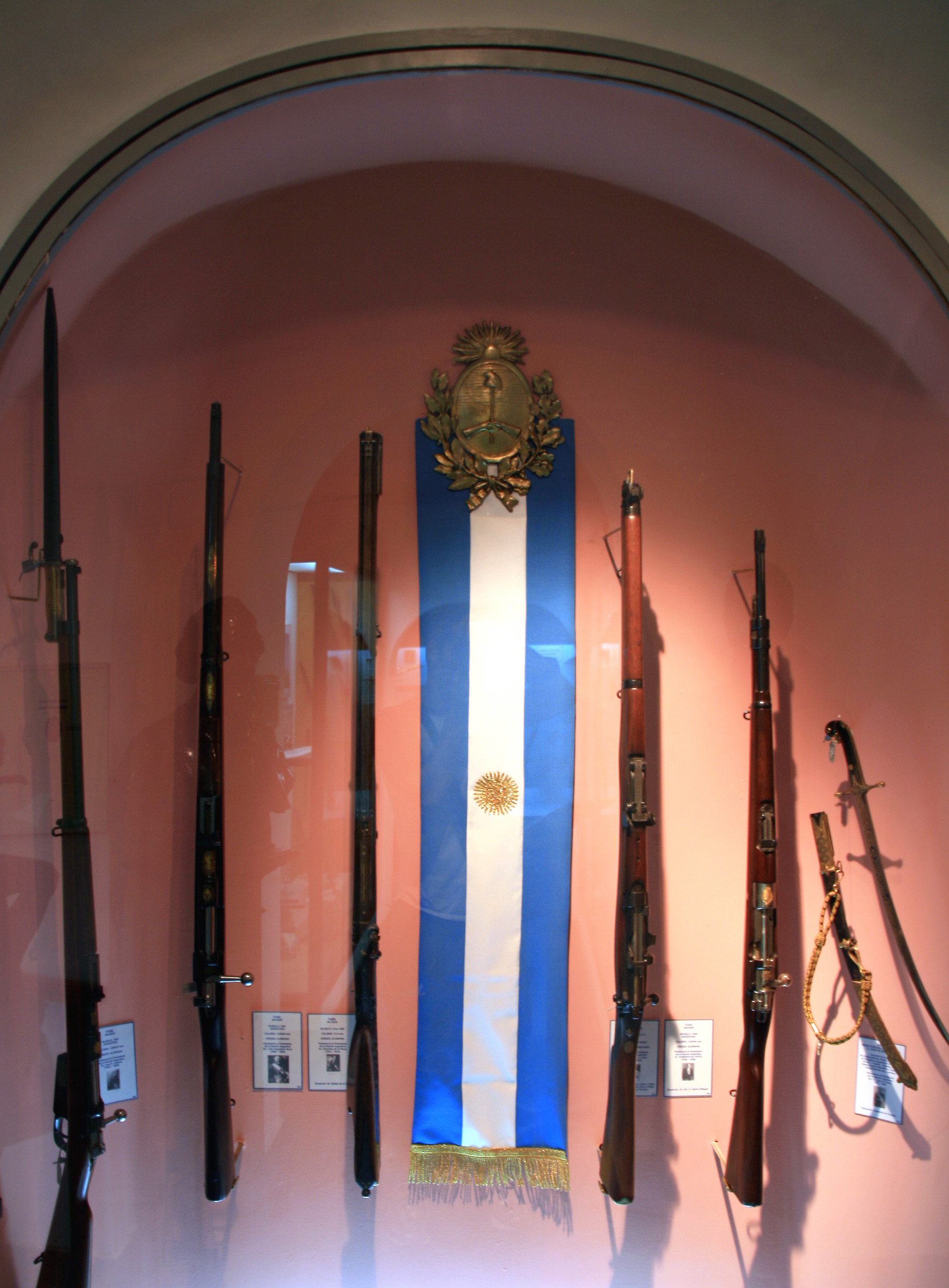 Presidential weapons, Museo de Armas de la Nacion, Buenos Aires.